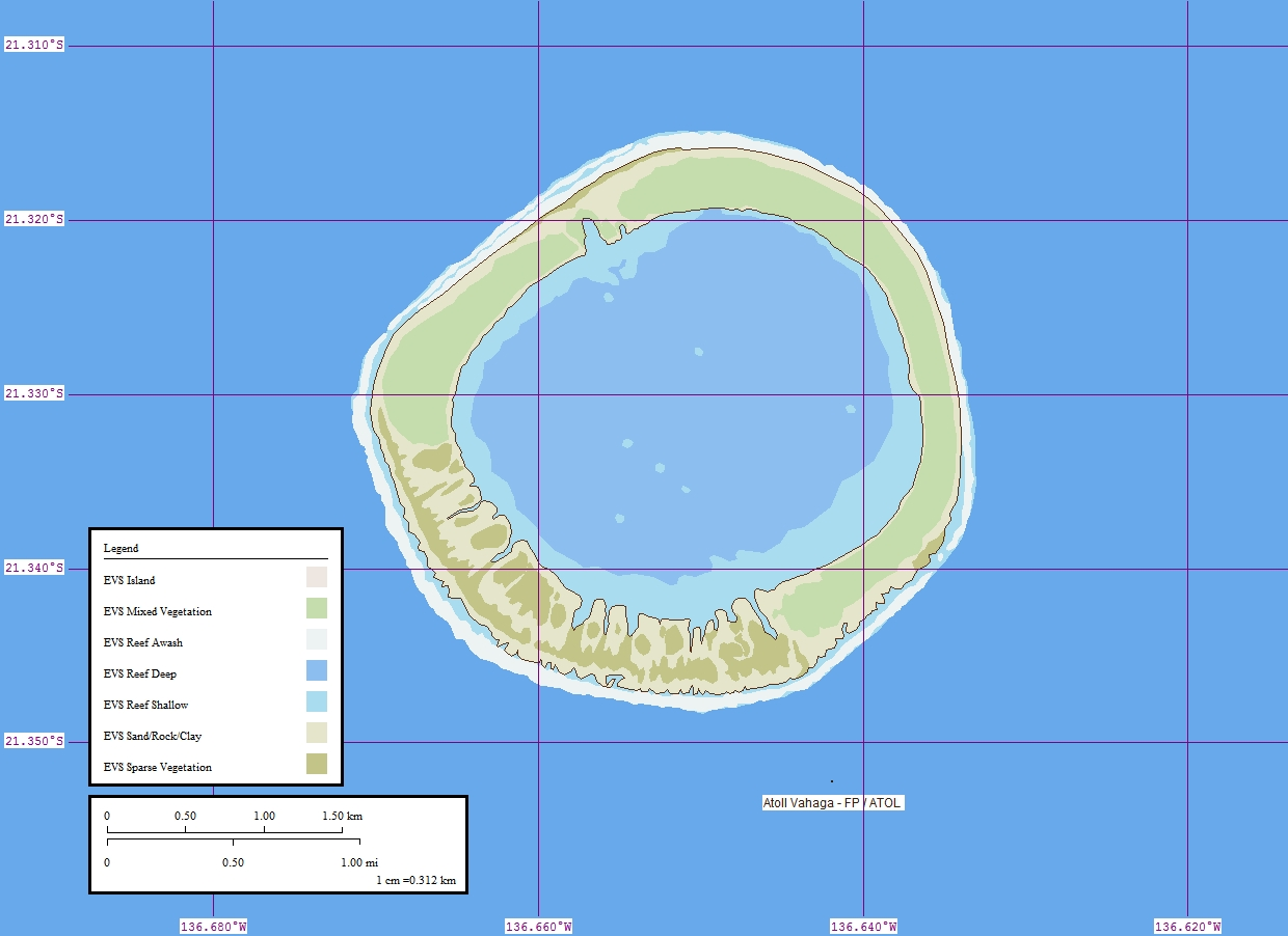 Atol Vahaga